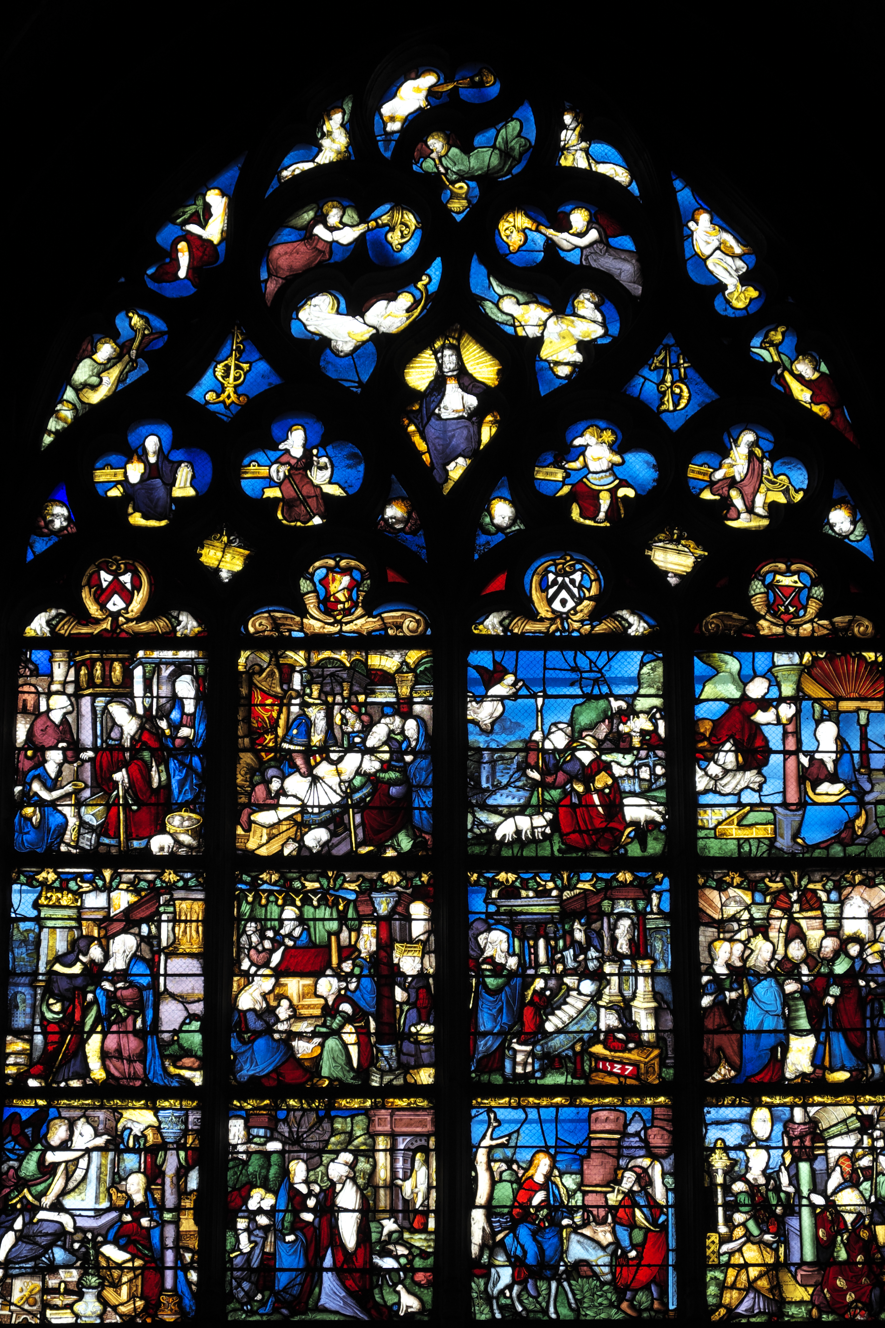 Bleiglasfenster (Baie 23) in der Stiftskirche Notre-Dame-en-Vaux in Châlons-en-Champagne im Département Marne (Champagne-Ardenne/Frankreich), mit der Jahreszahl 1527; Darstellung: Szenen aus dem Leben Marias; im Maßwerk: Dreifaltigkeit als Person mit drei Gesichtern